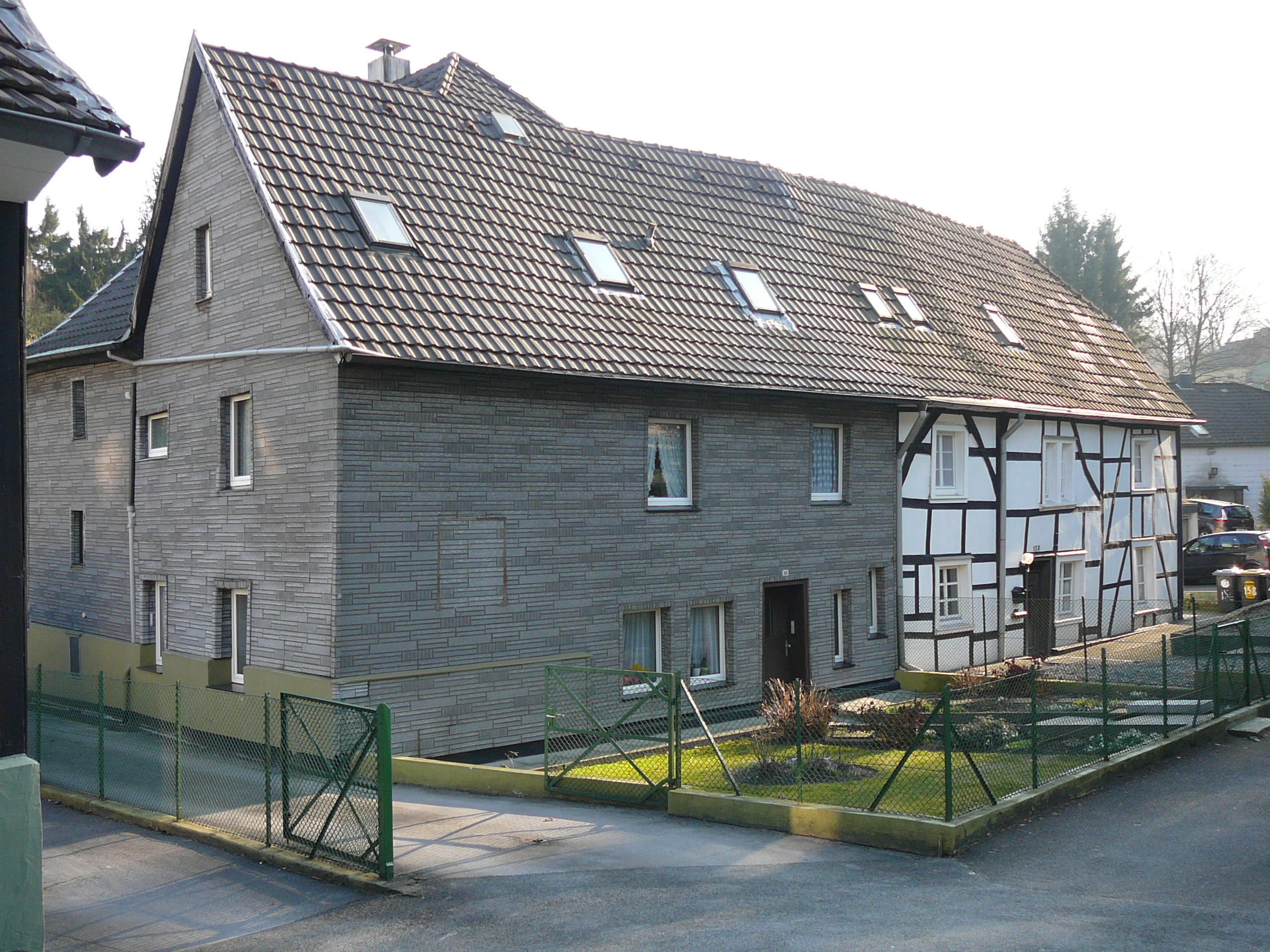 Kaiserstraße, Wuppertal